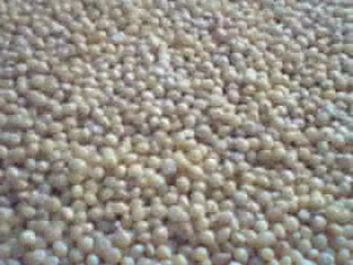 Millet